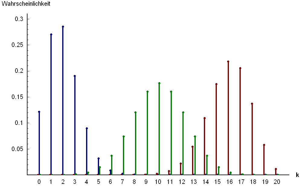 Binomial Verteilung zu den Parametern 0.1 (blau), 0.5 (grün) und 0.8 (rot).